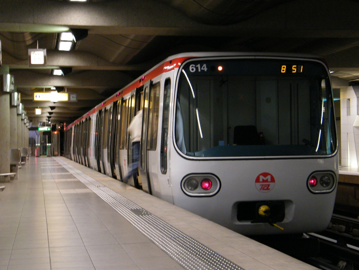 La rame n°614 est à la station Place Jean Jaurès sur la Ligne B du réseau TCL.